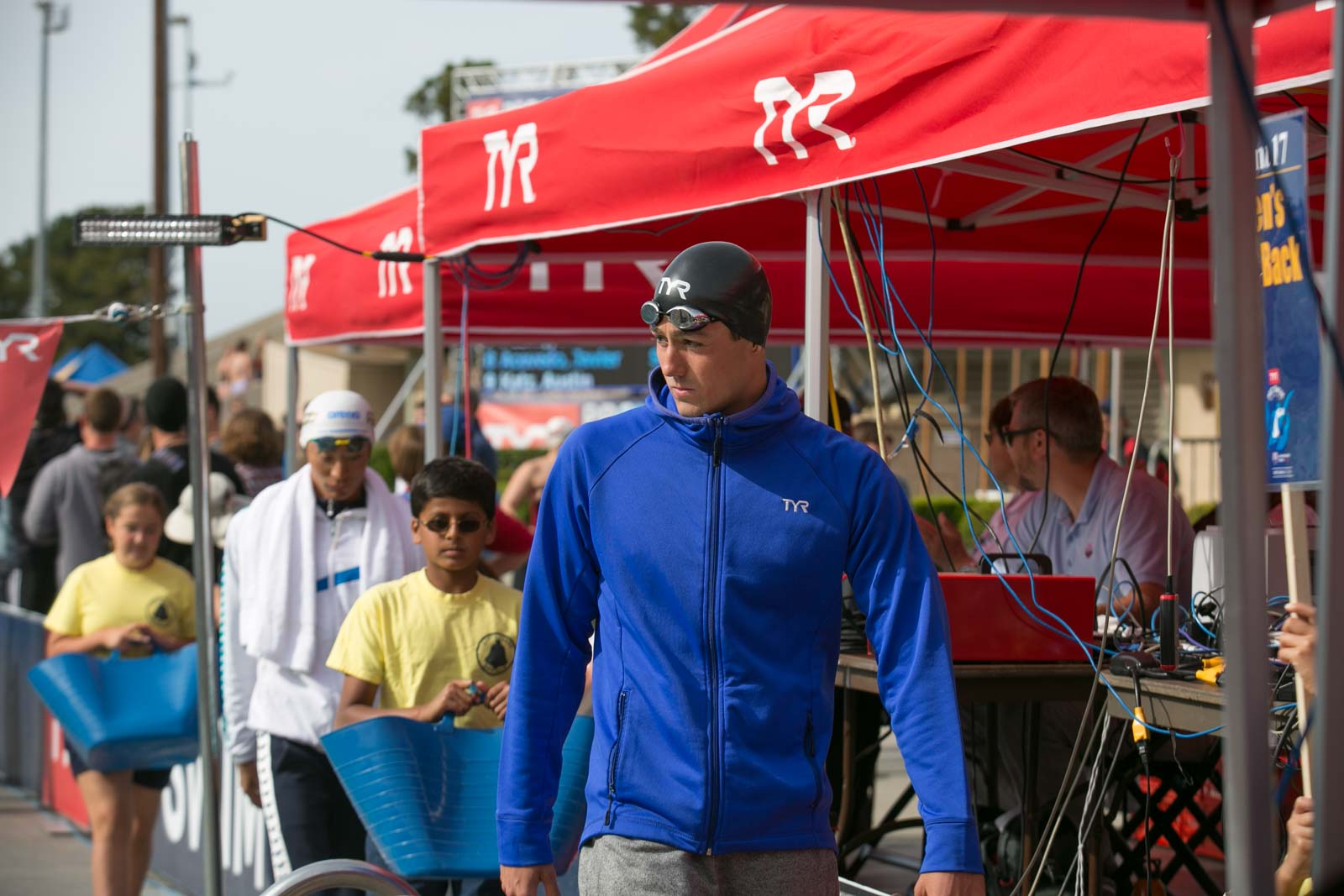 Javier Acevedo enters for 100 meter backstroke